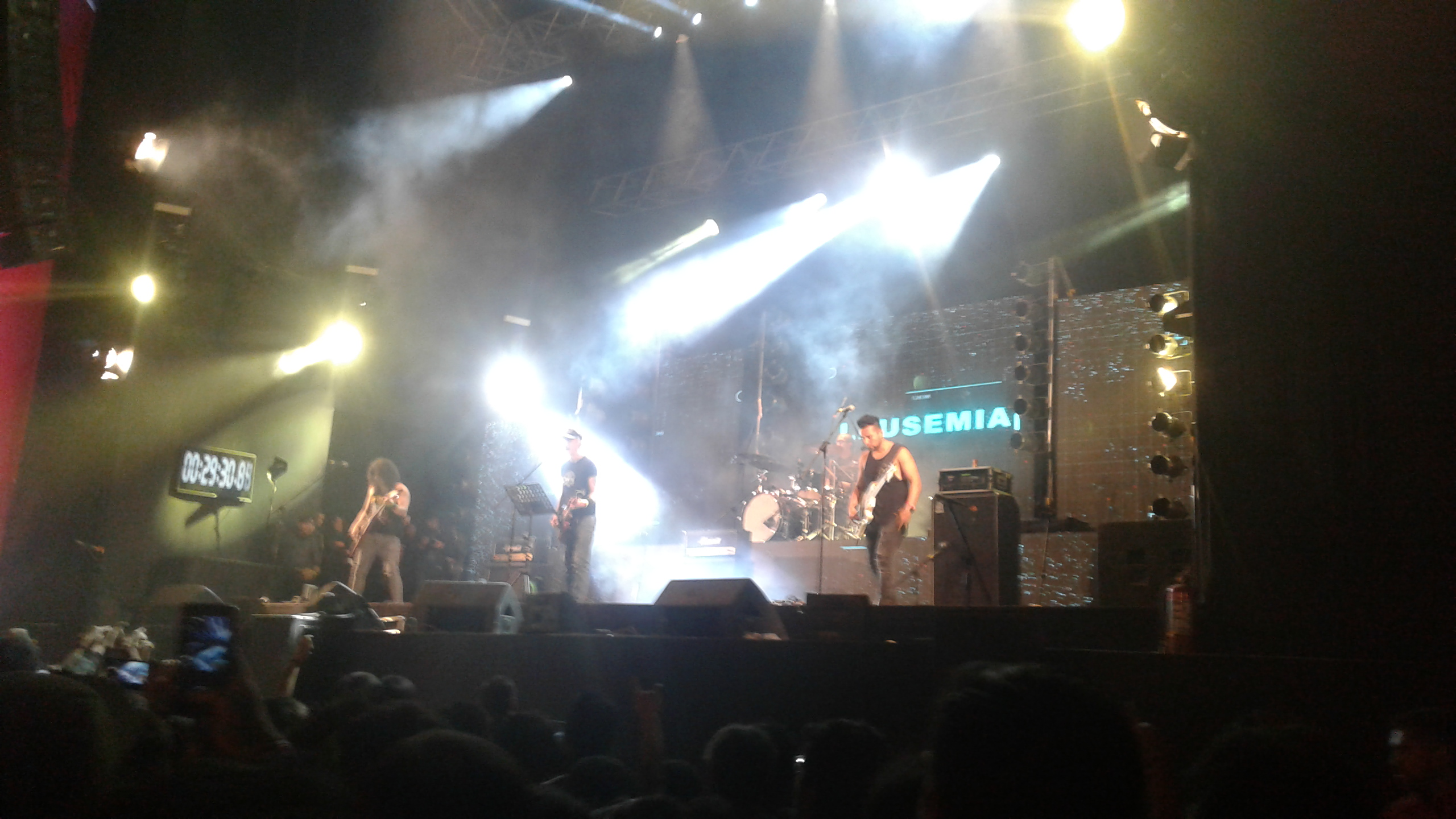 Leusemia en concierto en el año 2018